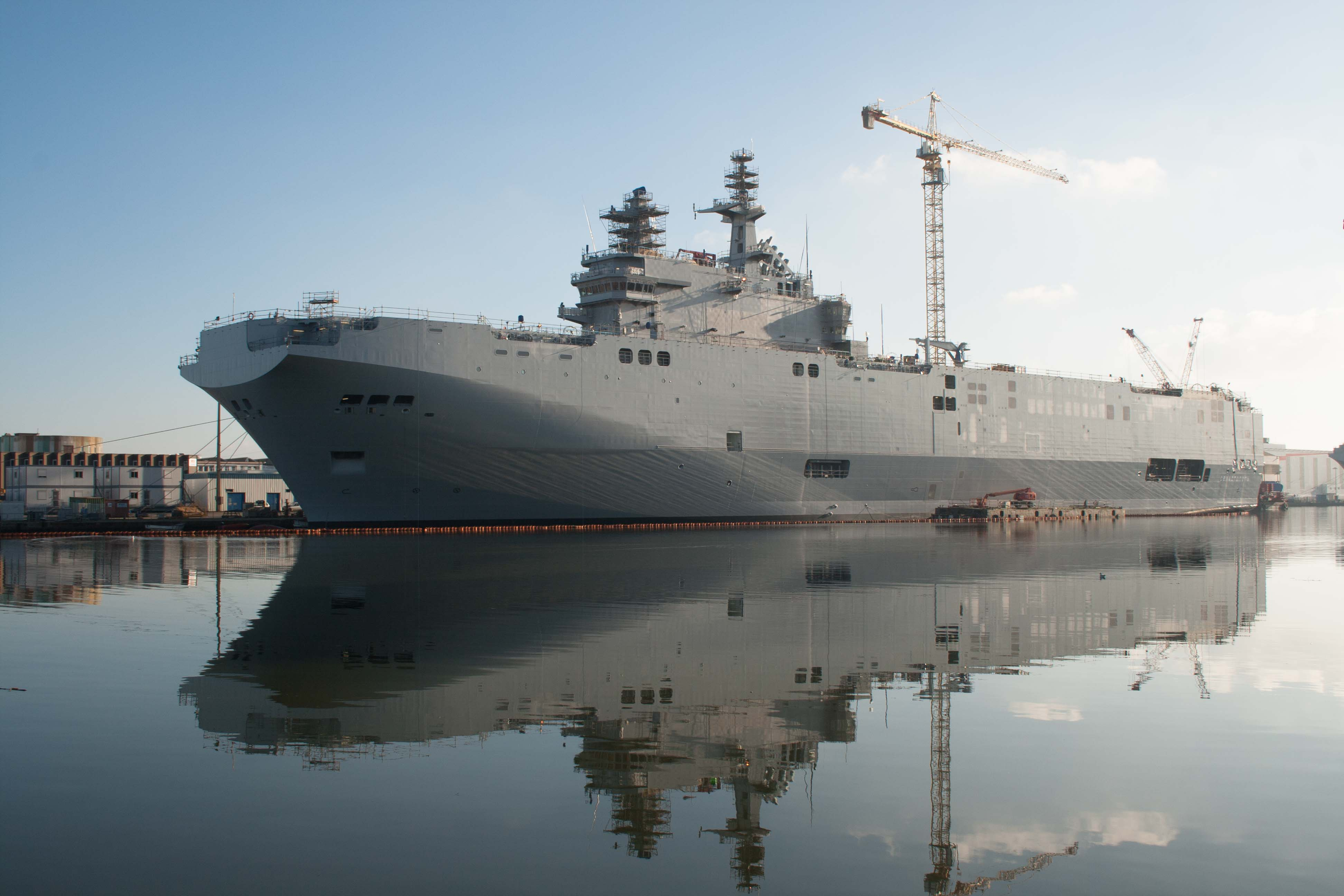 Le Sébastopol, BPC, en construction dans le port de Saint-Nazaire en décembre 2014.